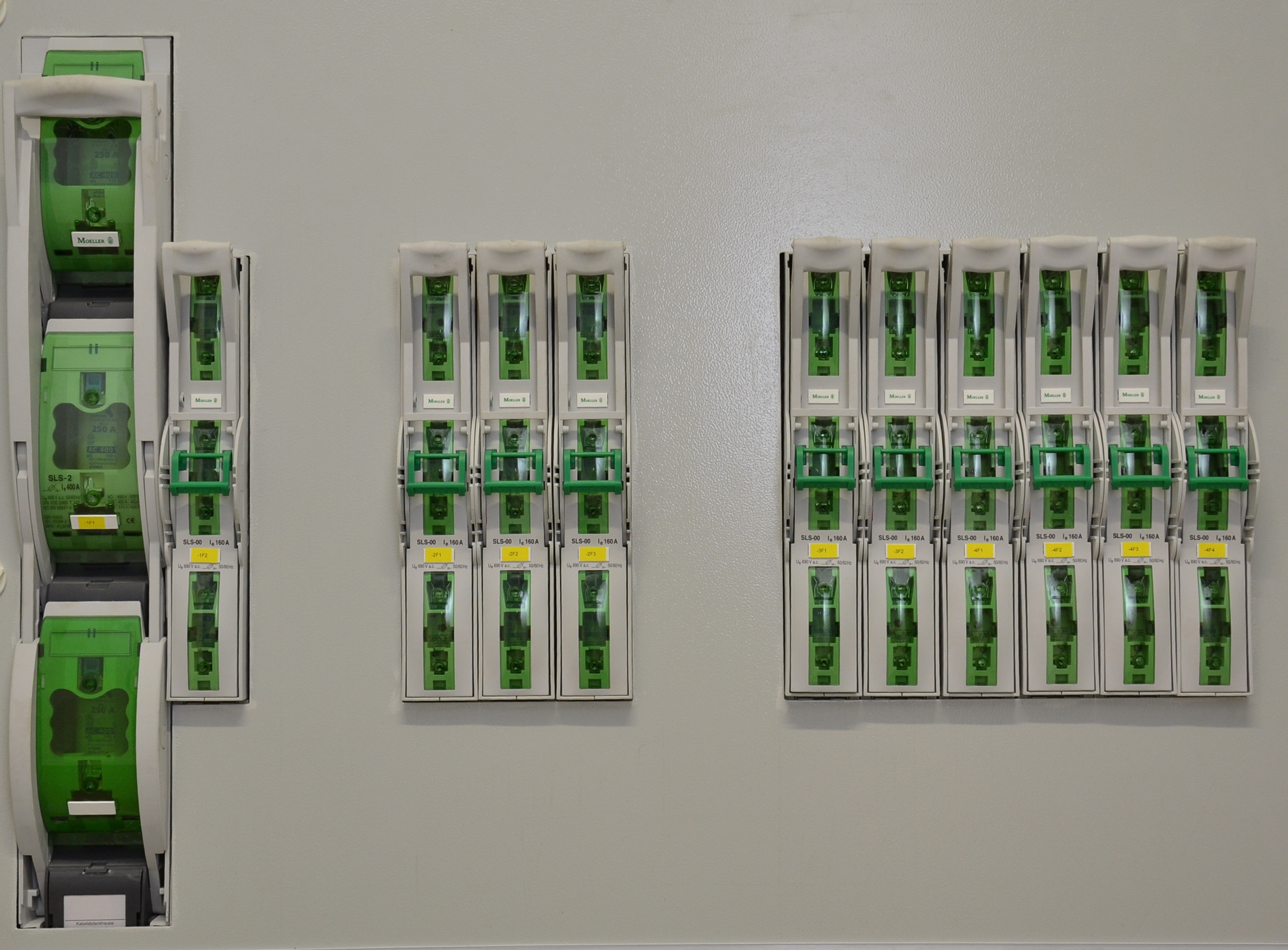 NH-Trenner einer Niederspannungshauptverteilung; Eingebaut in einem Biomasseheizwerk.